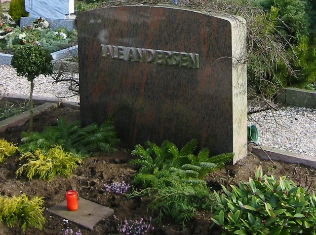 Grab von Lale Andersen auf dem Friedhof von Langeoog.